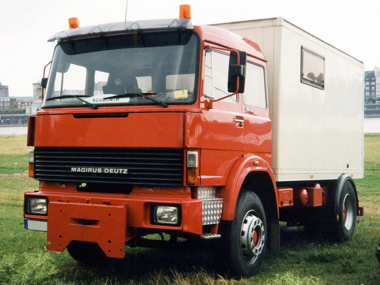 Magirus-Deutz T-Reihe Zugmaschine